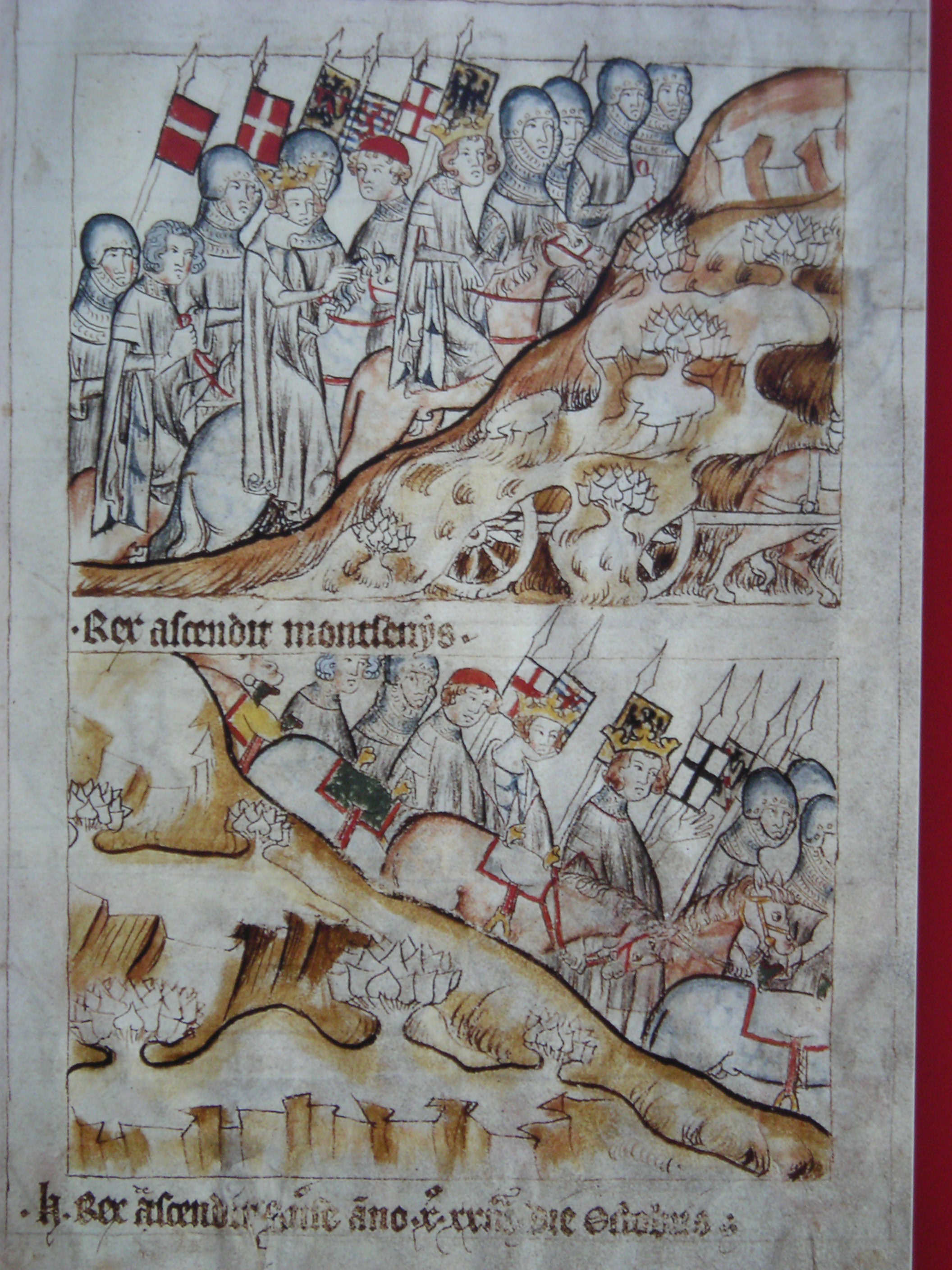 Heinrich VII. (HRR) bei der Alpenüberquerung anläßlich seiner Pilgerreise nach Rom, Abb. im Codex Balduini Trevirensis (hier eine Reproduktion), Seite 7 — Exponat im Deutschen Museum Verkehrszentrum. Dargestellt ist Balduin selbst, mit roter Kappe und den Bannern von Trier und Luxemburg, neben Heinrich (mit Königsfahne) und Margaret von Brabant. Ausserdem die Banner des Grafen von Blankenheim, von Amadeus V von Savoyen und Leopold I von Österreich (Aufstieg), sowie der Deutschritter (Konrad von Gundelfingen) und von Dampierre (Heinrich von Flandern) (Abstieg). Irmer (1881).